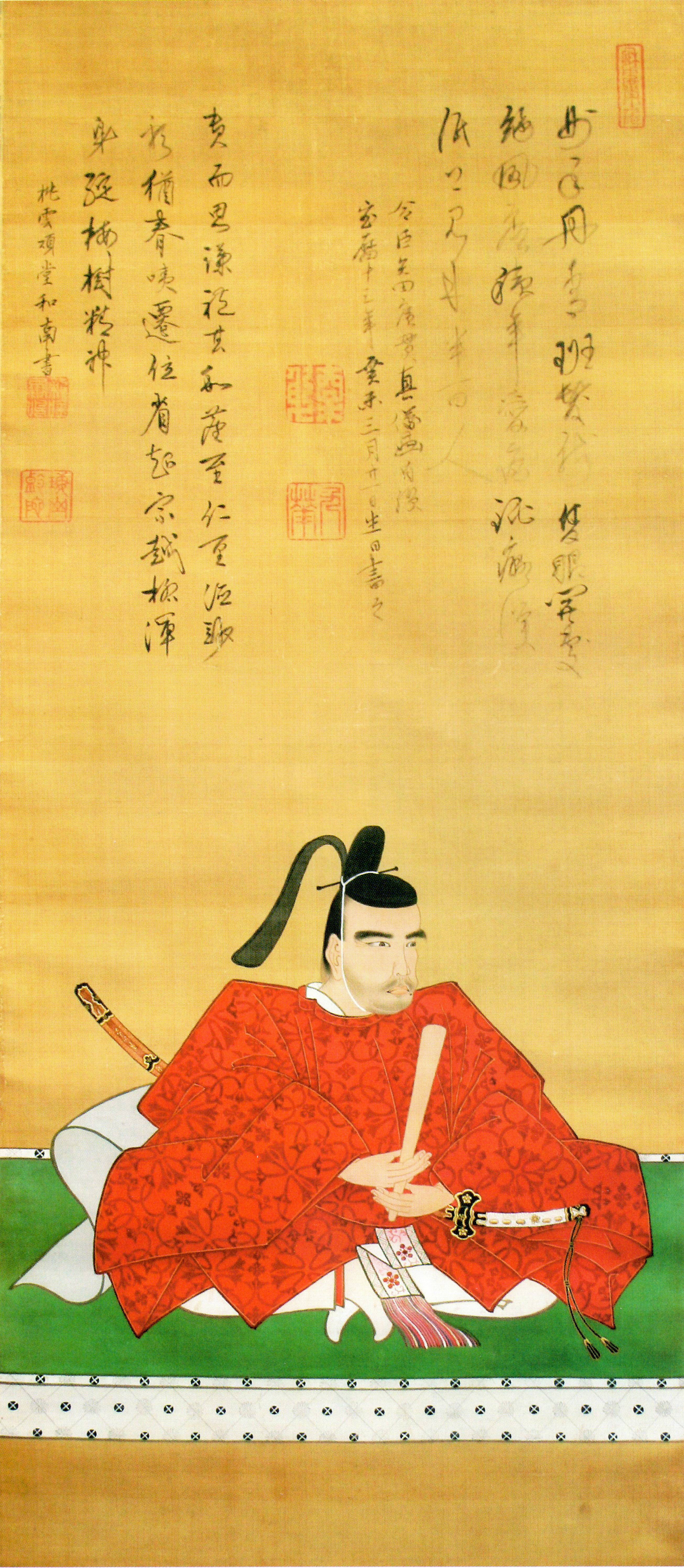 前田直躬の肖像。